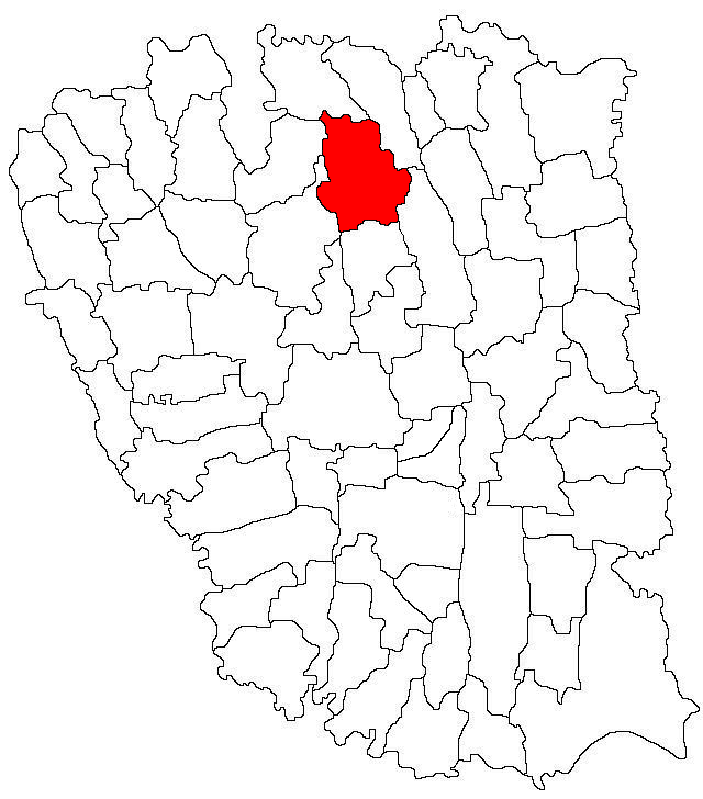 Categorie:Hărţi ale judeţului Galaţi